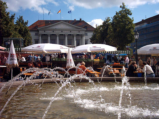 Regensburg (Bayern): Der fast überfüllte Bismarckplatz während des Bayerischen Jazzweekends 2004. Im Hintergrund die ehemalige französische Gesandtschaft, nunmehr Sitz des Polizeipräsidiums Niederbayern-Oberpfalz. Bildautor: Peter Bubenik - Aufnahmedatum: 10.07.2004 - Lizenz: GNU-FDL